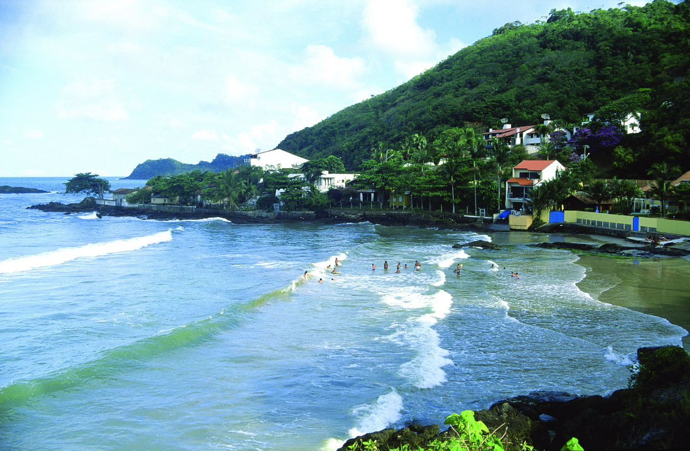 Praia do Jeremias